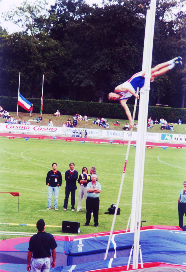 Décastar 2001 - Jiri Ryba, décathlonien tchèque. Saut à la perche